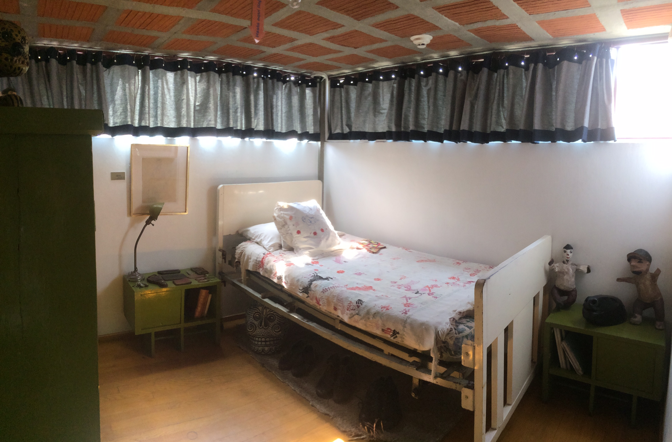 Recámara de Diego en Museo Casa Estudio Diego Rivera y Frida Kahlo. Se aprecian los bajos techos para la gran altura del pintor. Hay una flecha indicadora de la estatura de Diego Rivera, para hacer conciencia del poco espacio de altura que había.